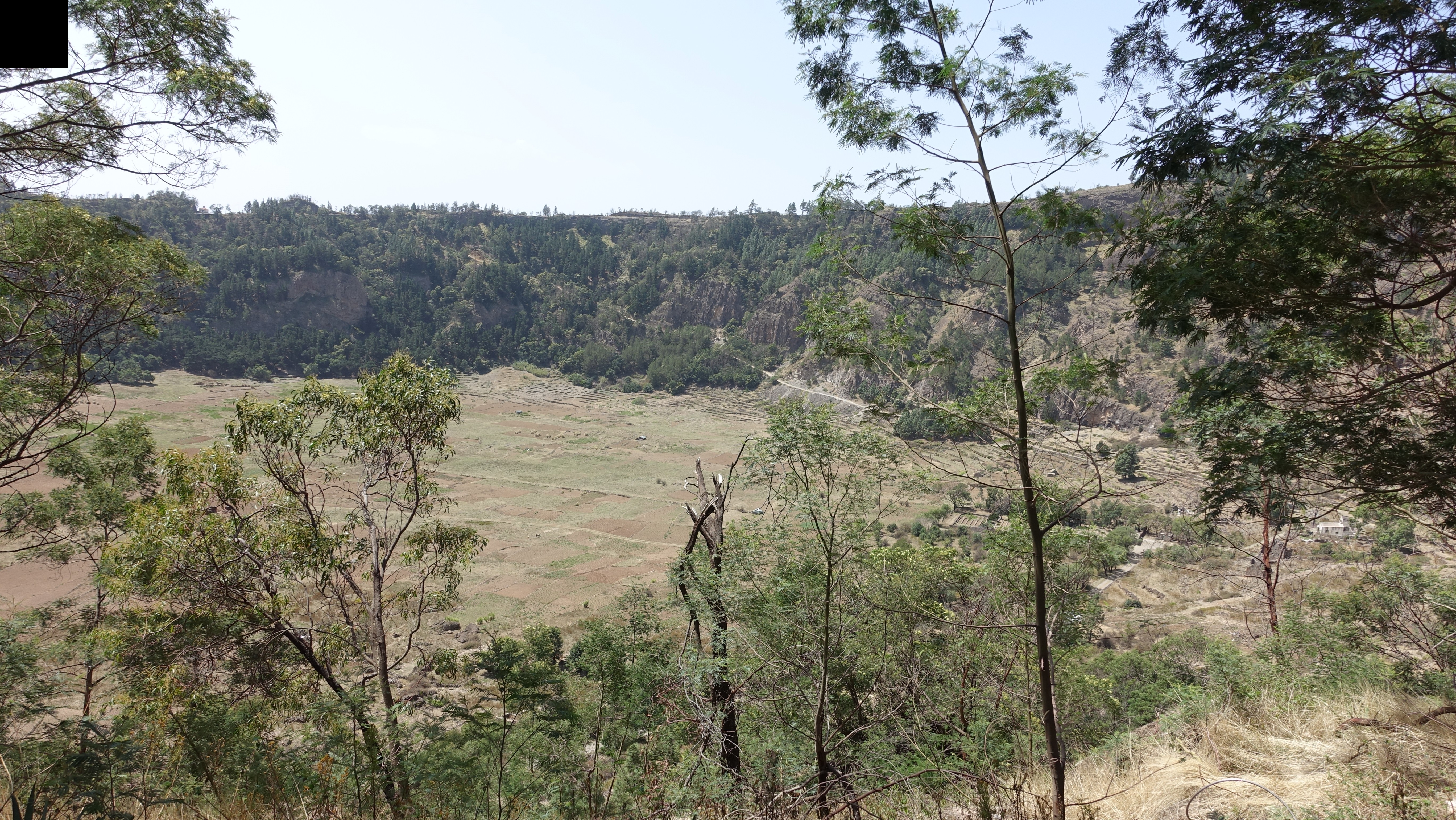 Ribeira do Paul-Cova Krater 1176 HM.ü.NN02